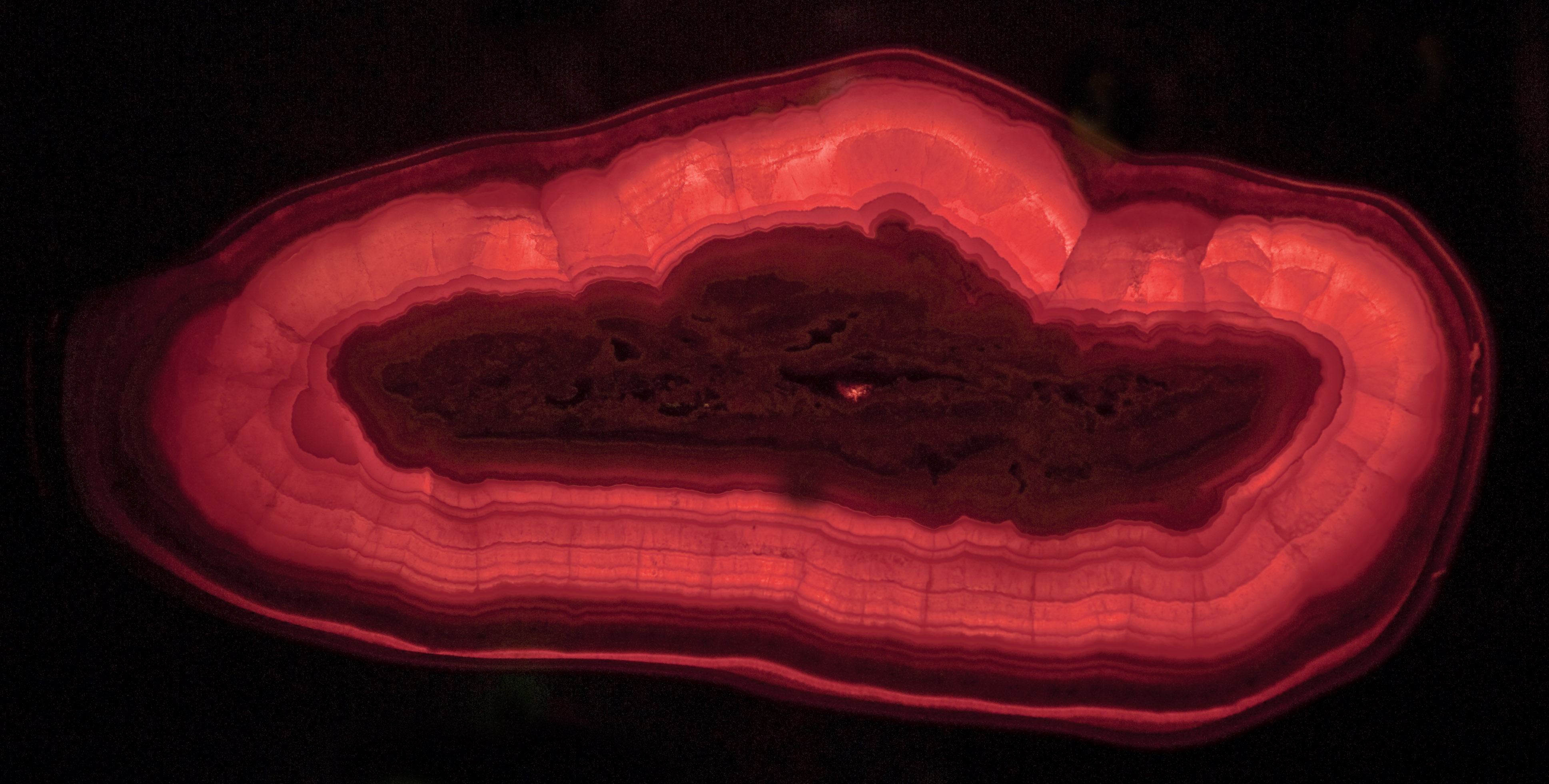 Agate, Minas Gerais, Brasil (Senckenberg Naturmuseum, Frankfurt, Germany)